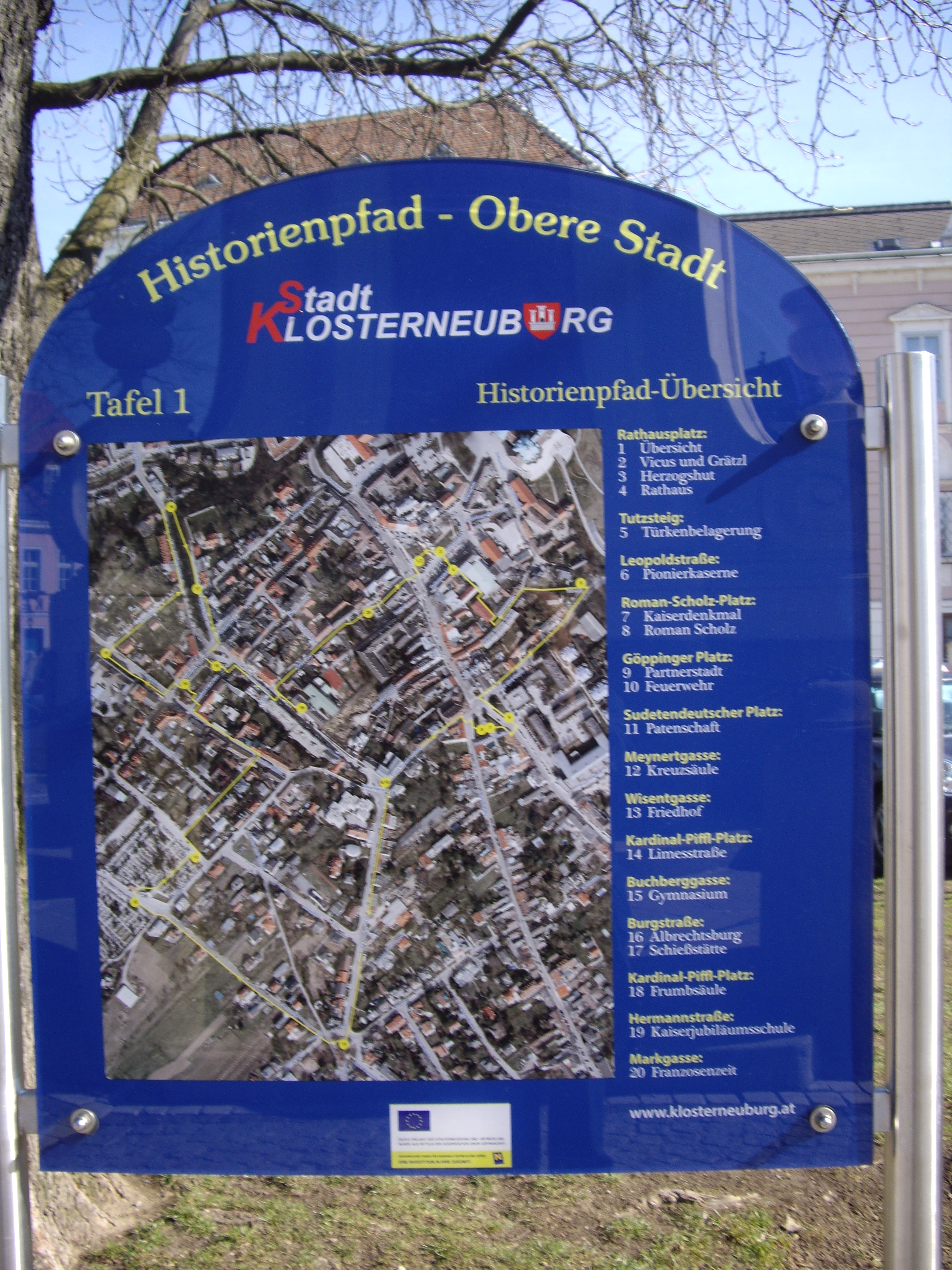 Pado de Historioj - Supera Urbo: Tabulo 1 Superrigardo.